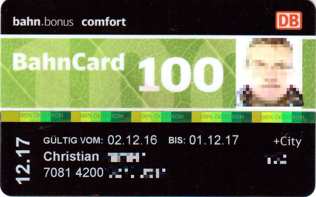 Bahncard 100 für das Jahr 2017 Grüner Streifen, der ehemalige Zusatz "Mobility" wurde wieder weggelassen.